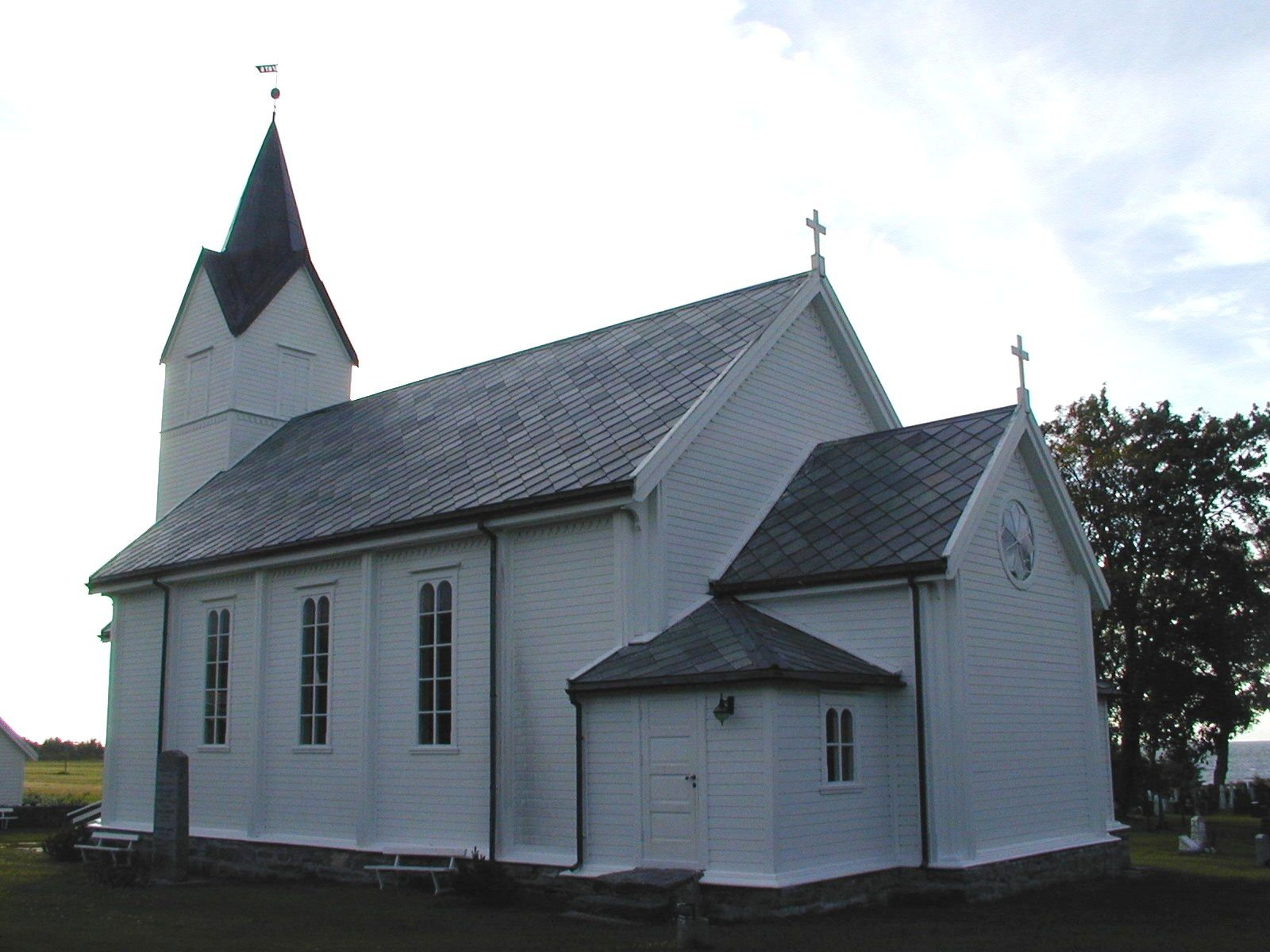 Fjørtoft kirke. Foto: Max Ingar Mørk. Fra Riksantikvarens Kulturminnesøk.